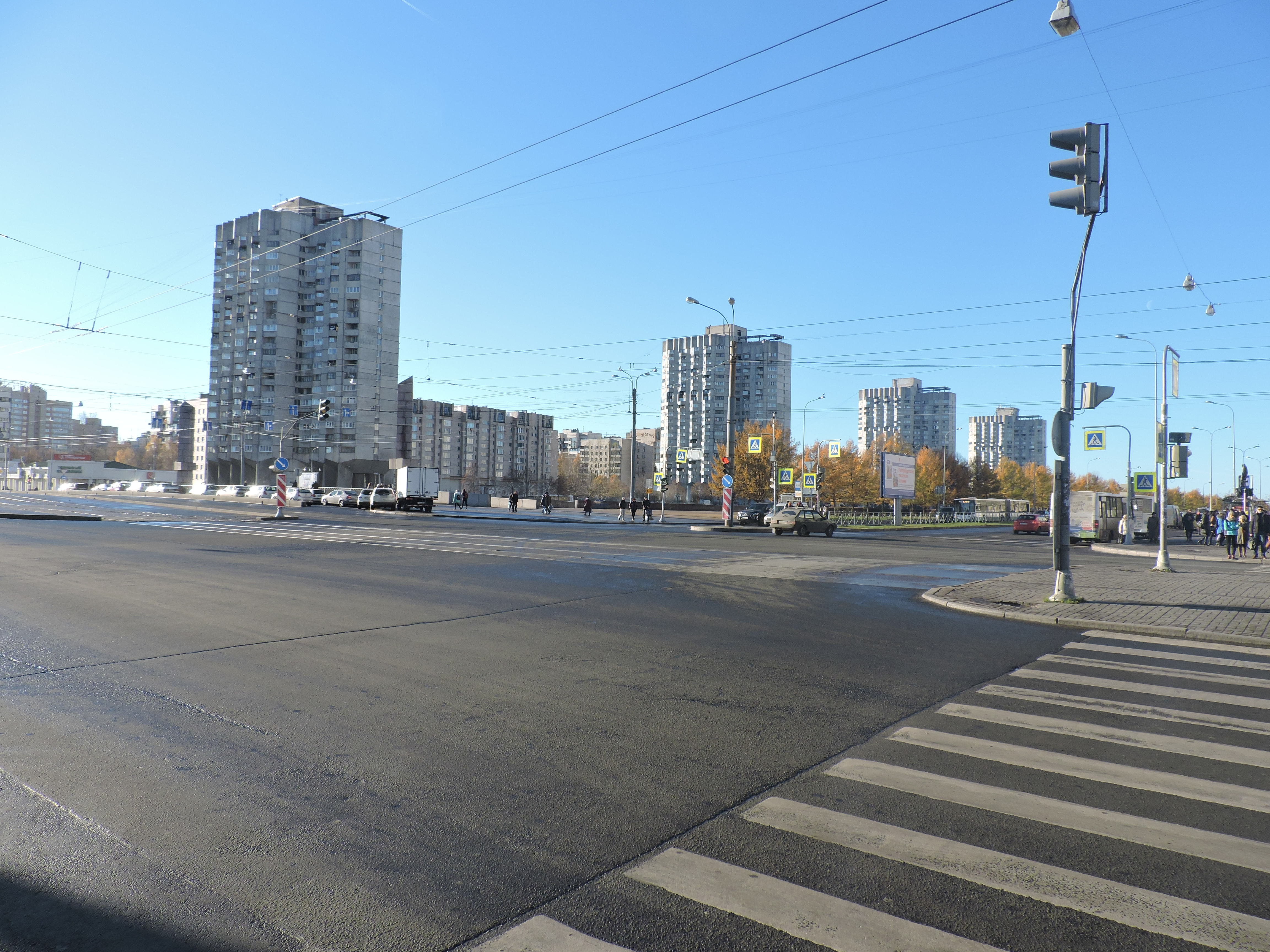 Новосмоленские башни